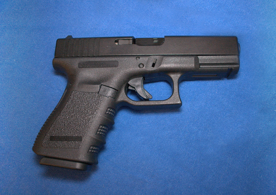 Glock 19 Pistol